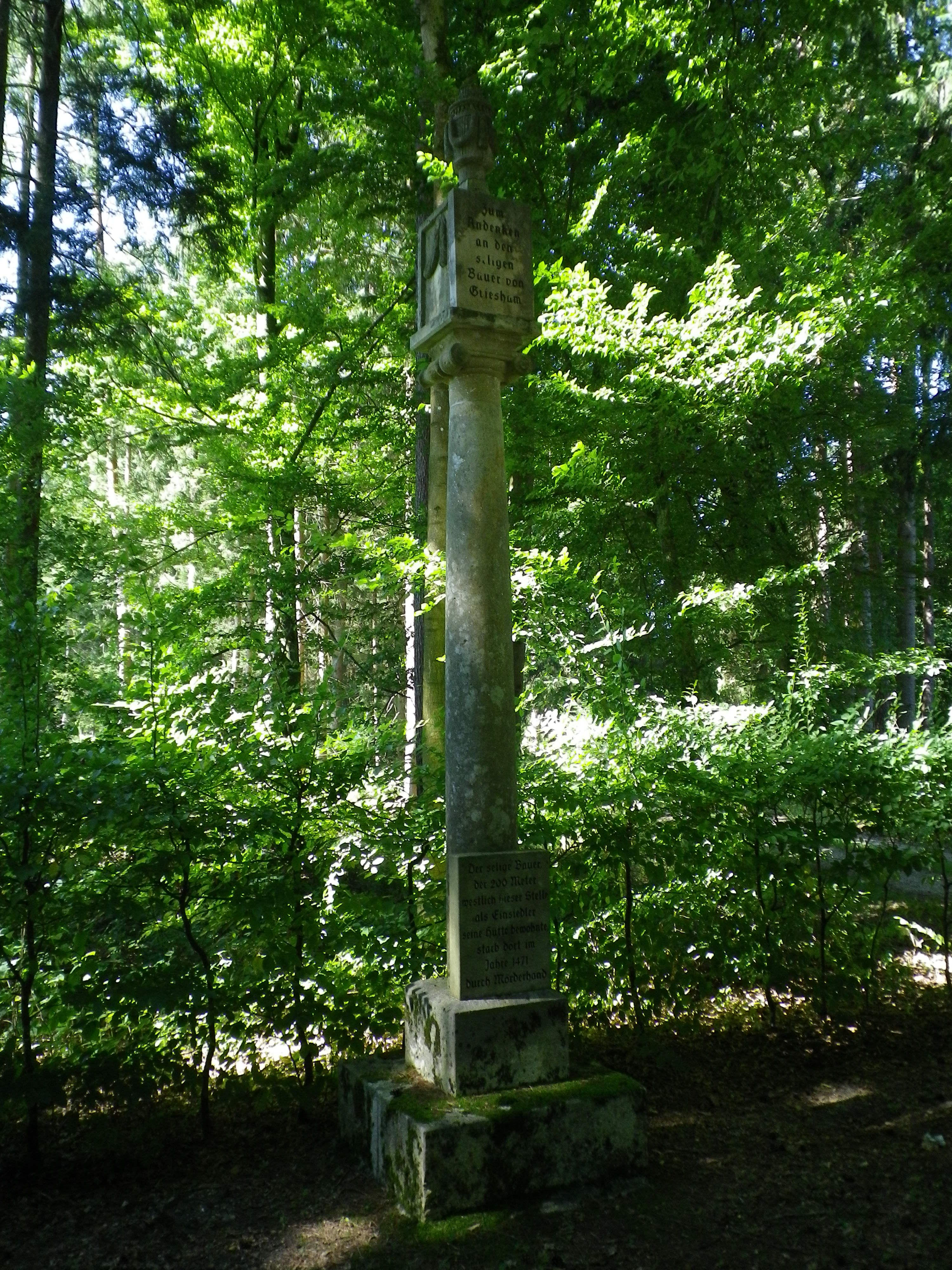 Gedenksäule zu Ehren des "Seligen Bauern von Vohburg" im Dürnbucher Forst bei Vohburg an der Donau. Inschrift oben: Zum Andenken an den seligen Bauer von Griesham Inschrift unten: Der selige Bauer, der 200 Meter westlich dieser Stelle als Einsiedler seine Hütte bewohnte, starb dort im Jahre 1471 durch Mörderhand This is a photograph of an architectural monument. It is on the list of cultural monuments of Dürnbucher Forst (Niederbayern), no. ?